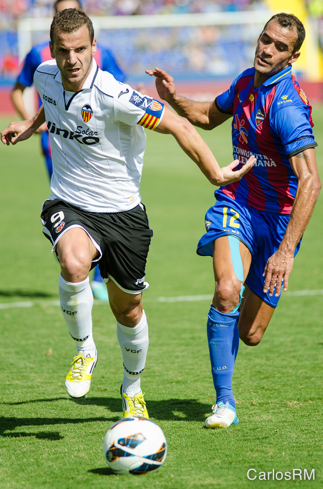 Soldado i Juanfran es disputen un baló en un Llevant - València.